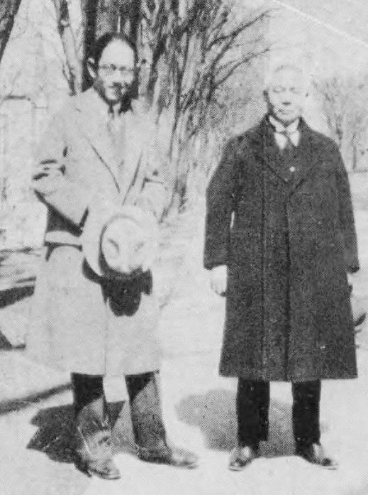 平田重雄(左)と岩崎清七